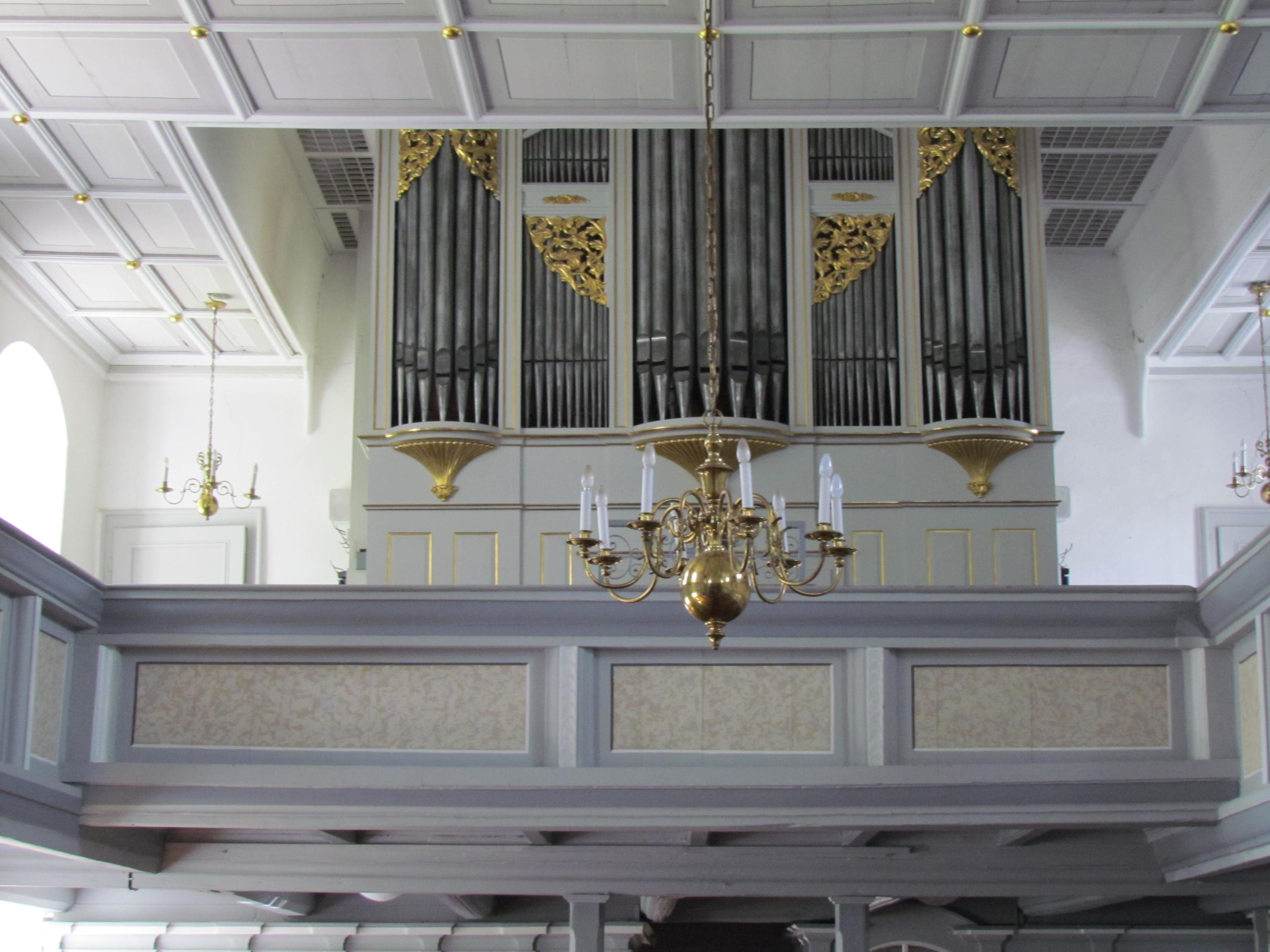 Empore mit der Kreutzbach-Orgel aus dem Jahr 1860 in der Kirche von Bockau.